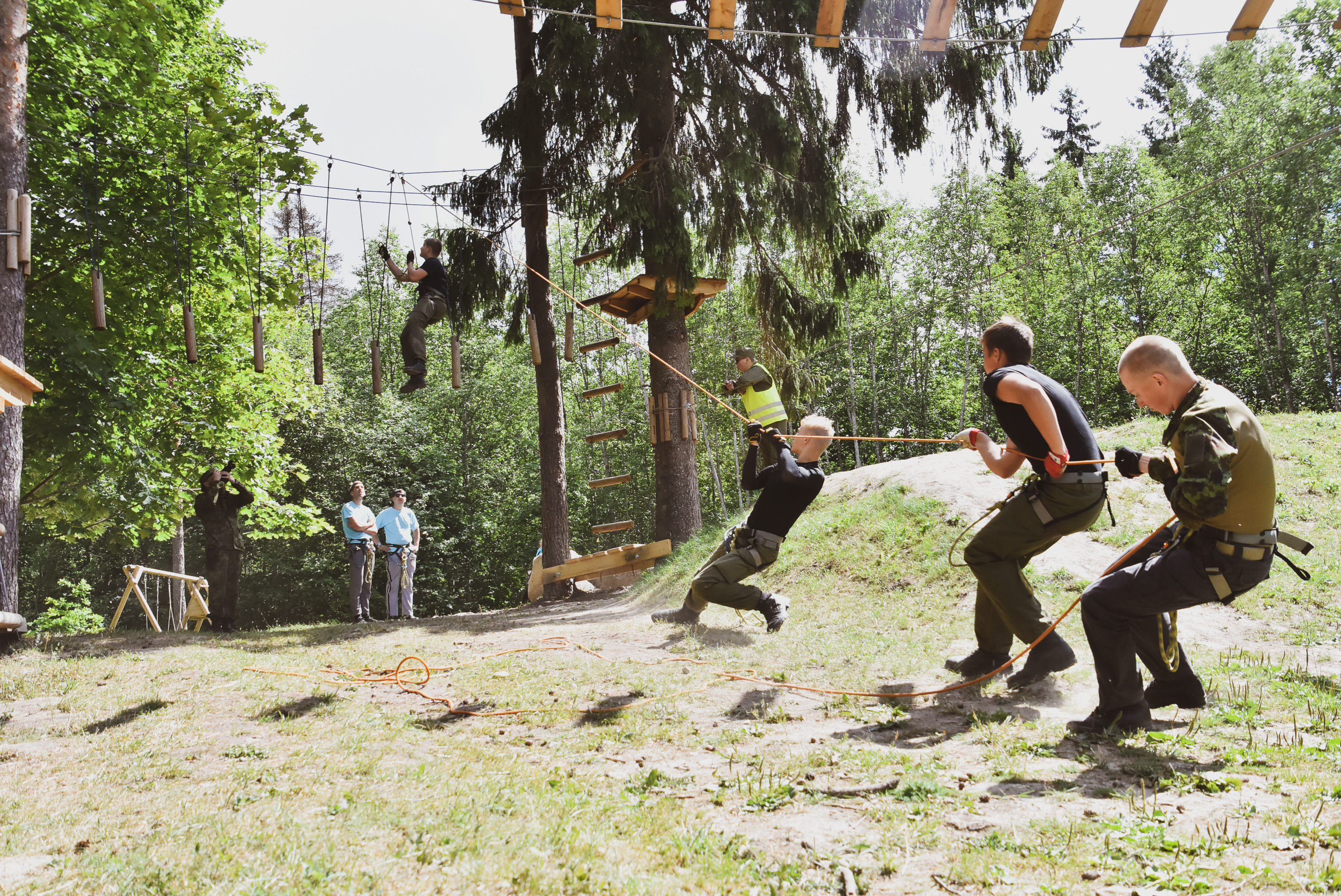 Mini-Erna 2018